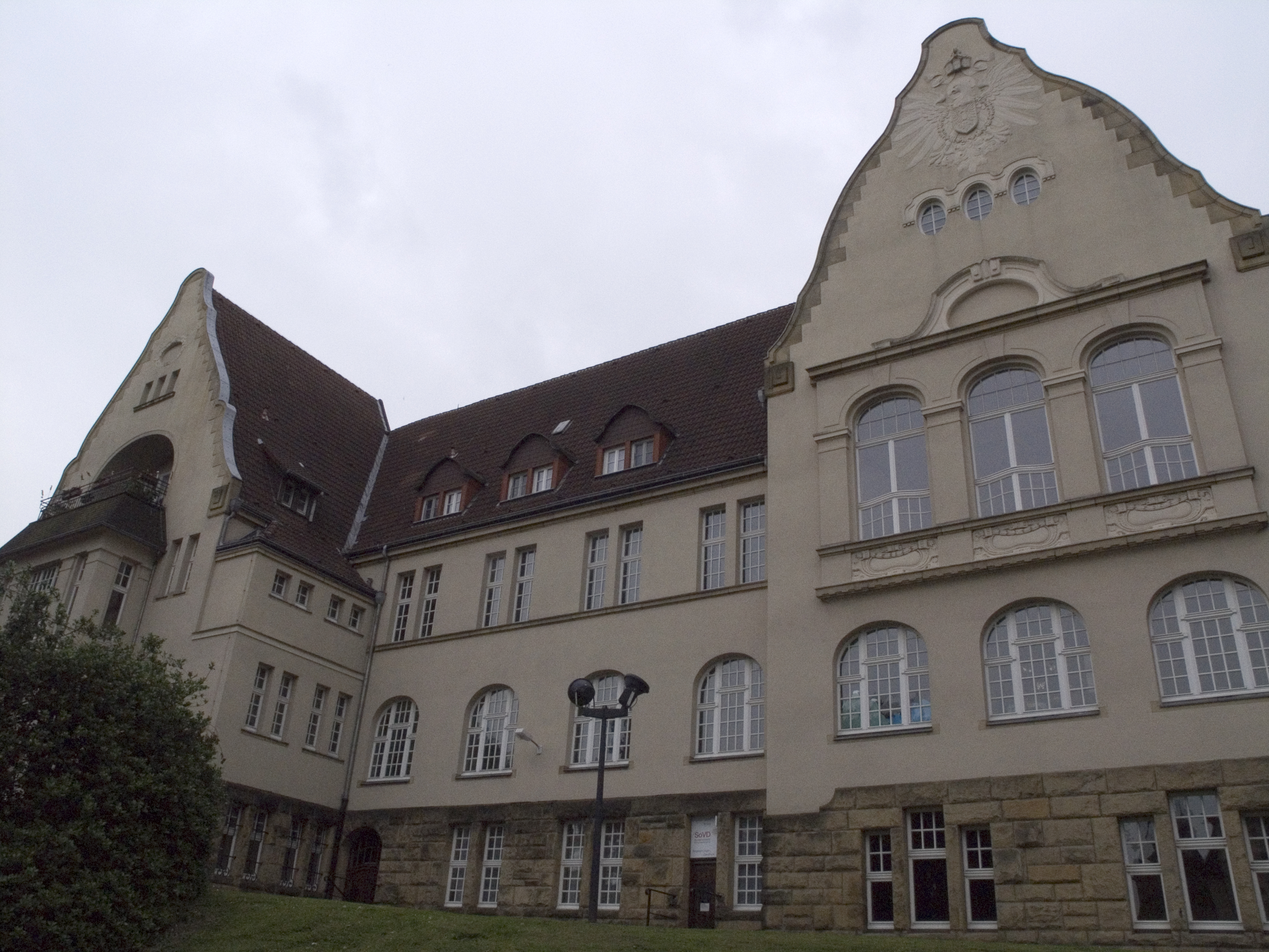 Северный Рейн - Вестфалия, Эссен – ратуша района Край